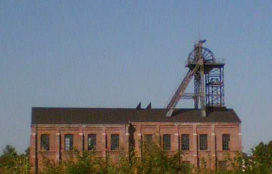 Tomsonbock Fördergerüt der ehemaligen Zeche Gneisenau